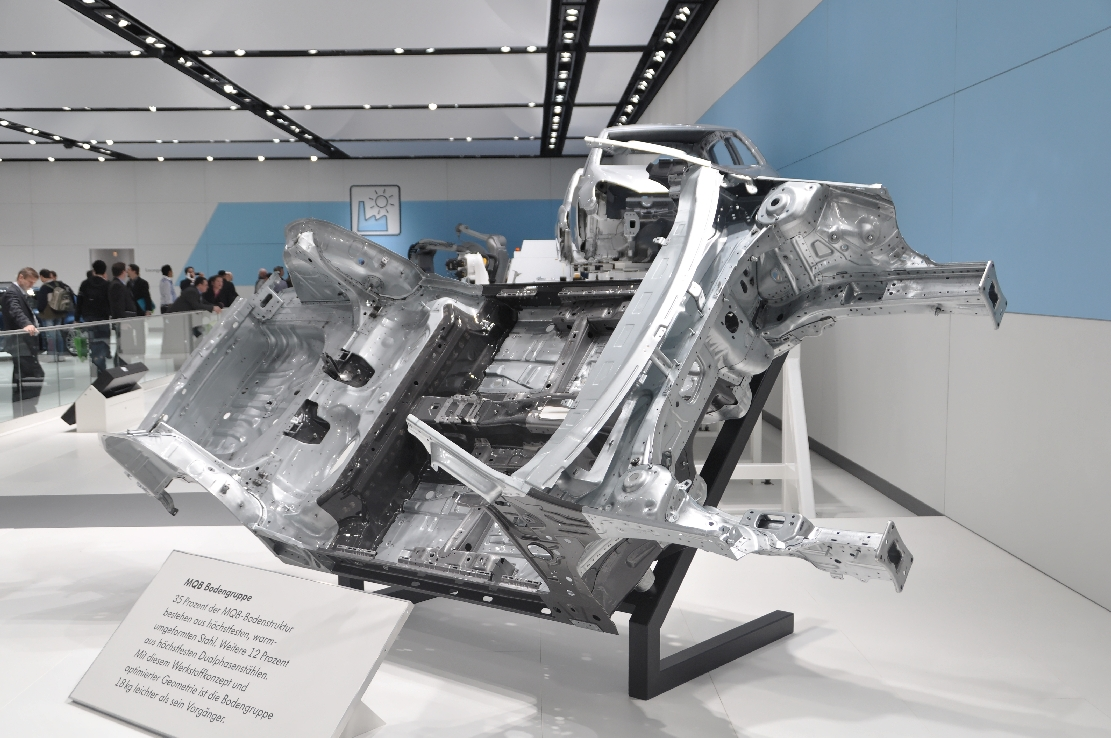 MQB Bodengrppe auf der Hannover-Messe April 2012 Dieses Foto entstand durch die Mithilfe des gemeinnützigen Vereins Skillshare bei der Akkreditierung als Fotograf. Infos unter skillshare.eu Skillshare e.V. ist ein eingetragener gemeinnütziger Verein zur Förderung der Bildung durch Unterstützung der Erstellung, Sammlung und Verbreitung so genannten freien Wissens. IBAN: DE16 8306 5408 0004 8850 66 BIC: GENODEF1SLR Bank: VR-Bank Altenburger Land